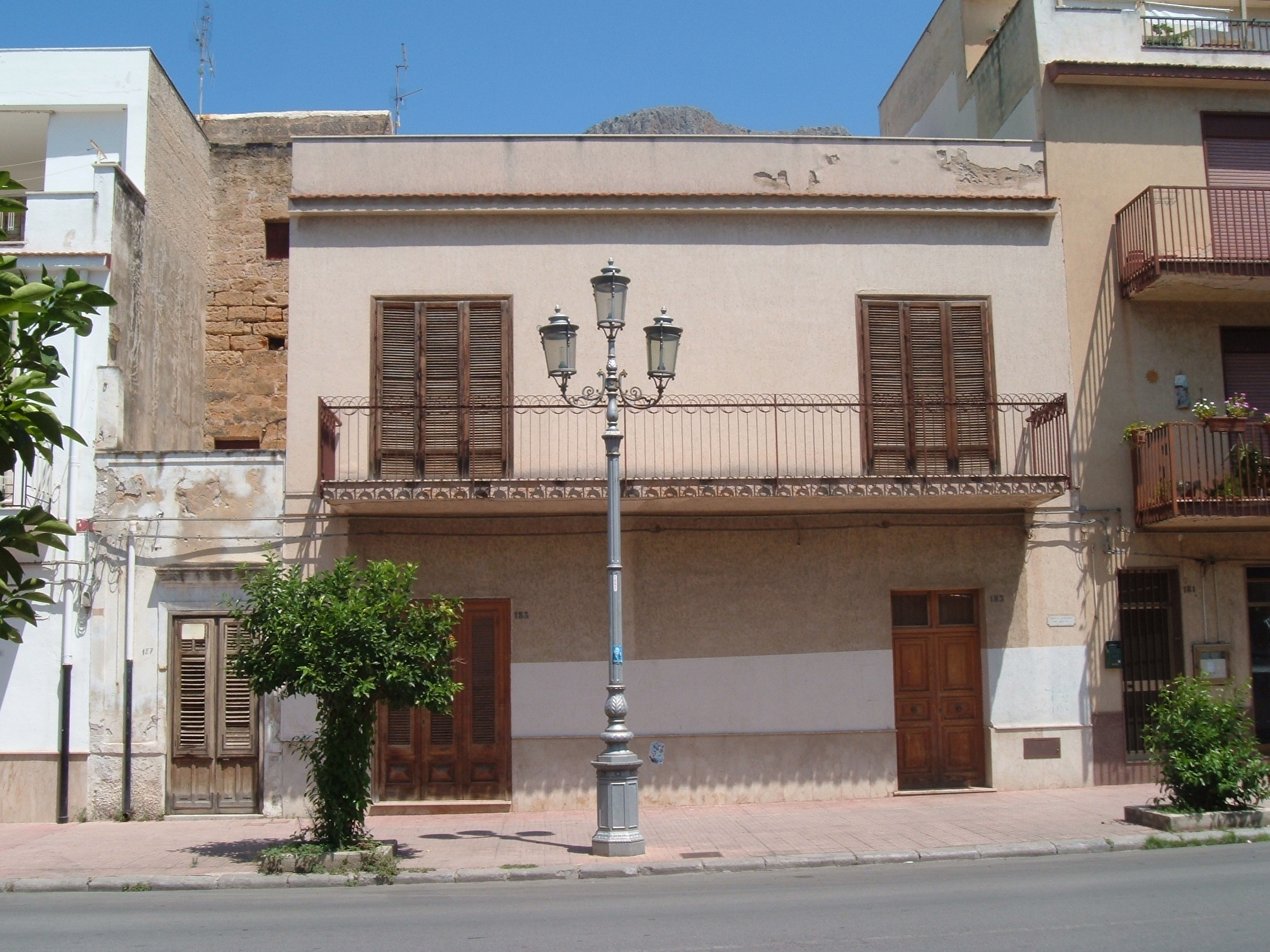 La casa di Gaetano Badalamenti a Cinisi, distante cento passi dalla dimora di Peppino Impastato.